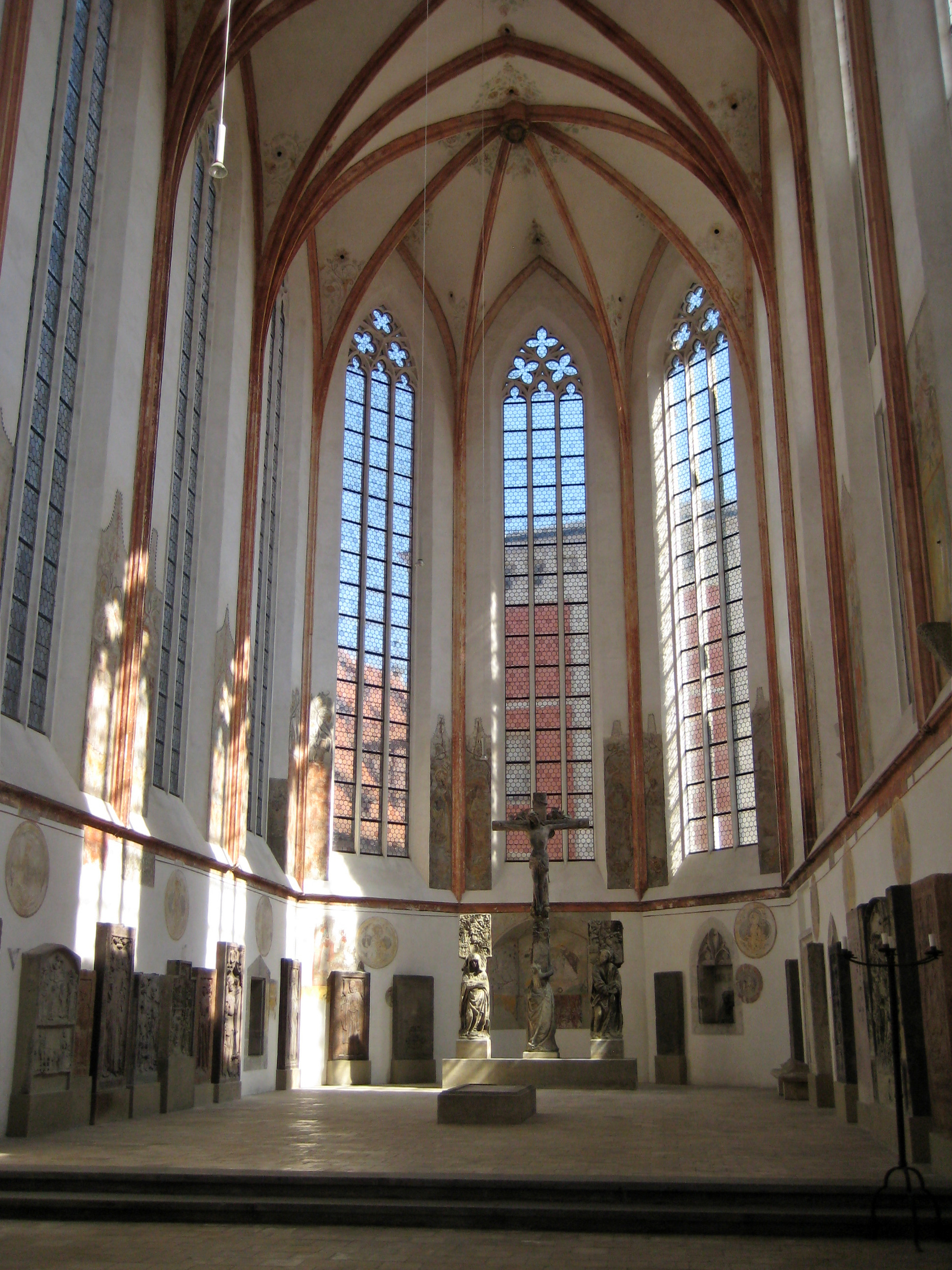 Inneres der Minoritenkirche in Regensburg. Blick in die Apsis.